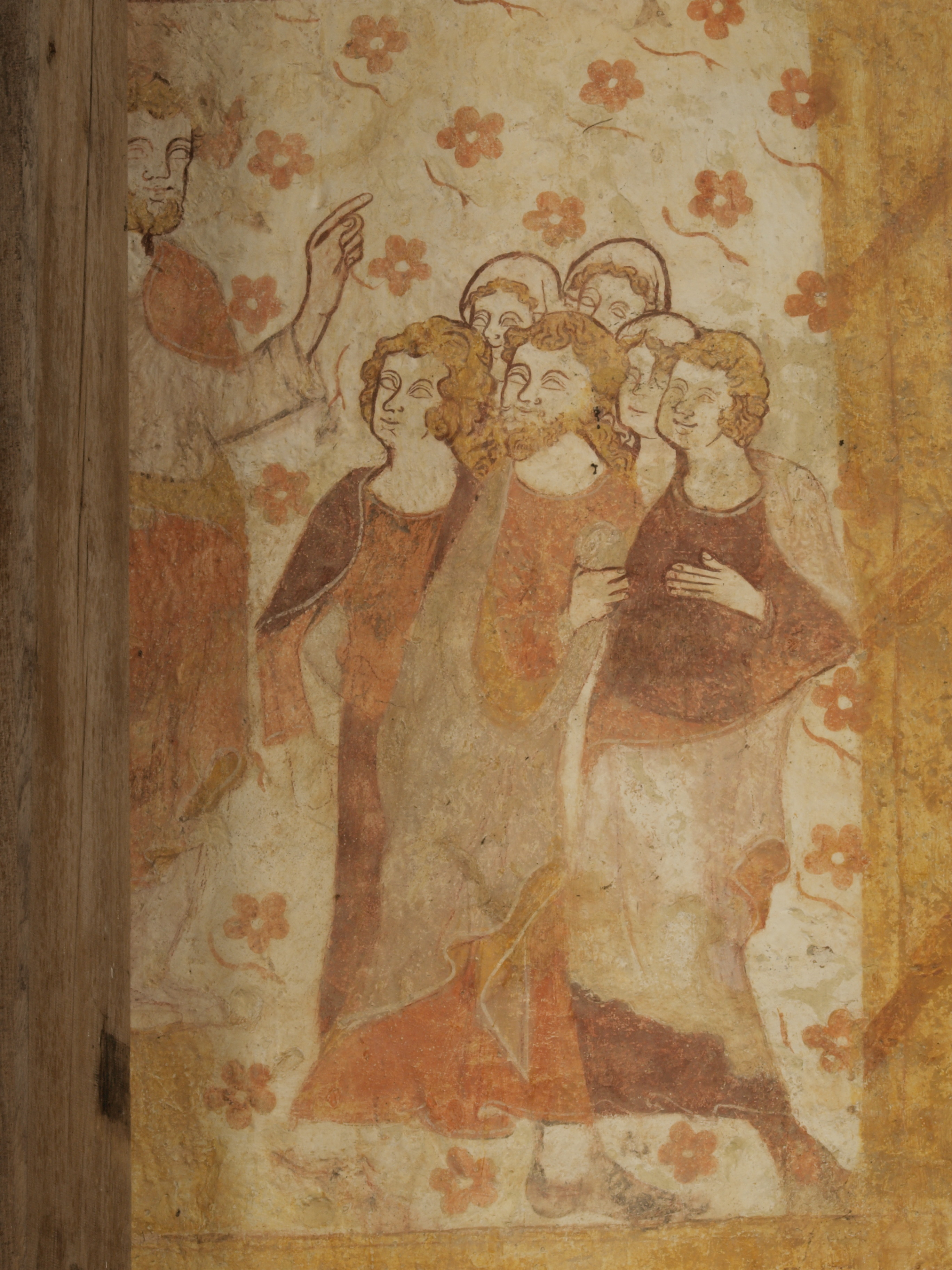 Église Saint-Pierre-et-Saint-Paul de Moutiers-en-Puisaye; peinture murale